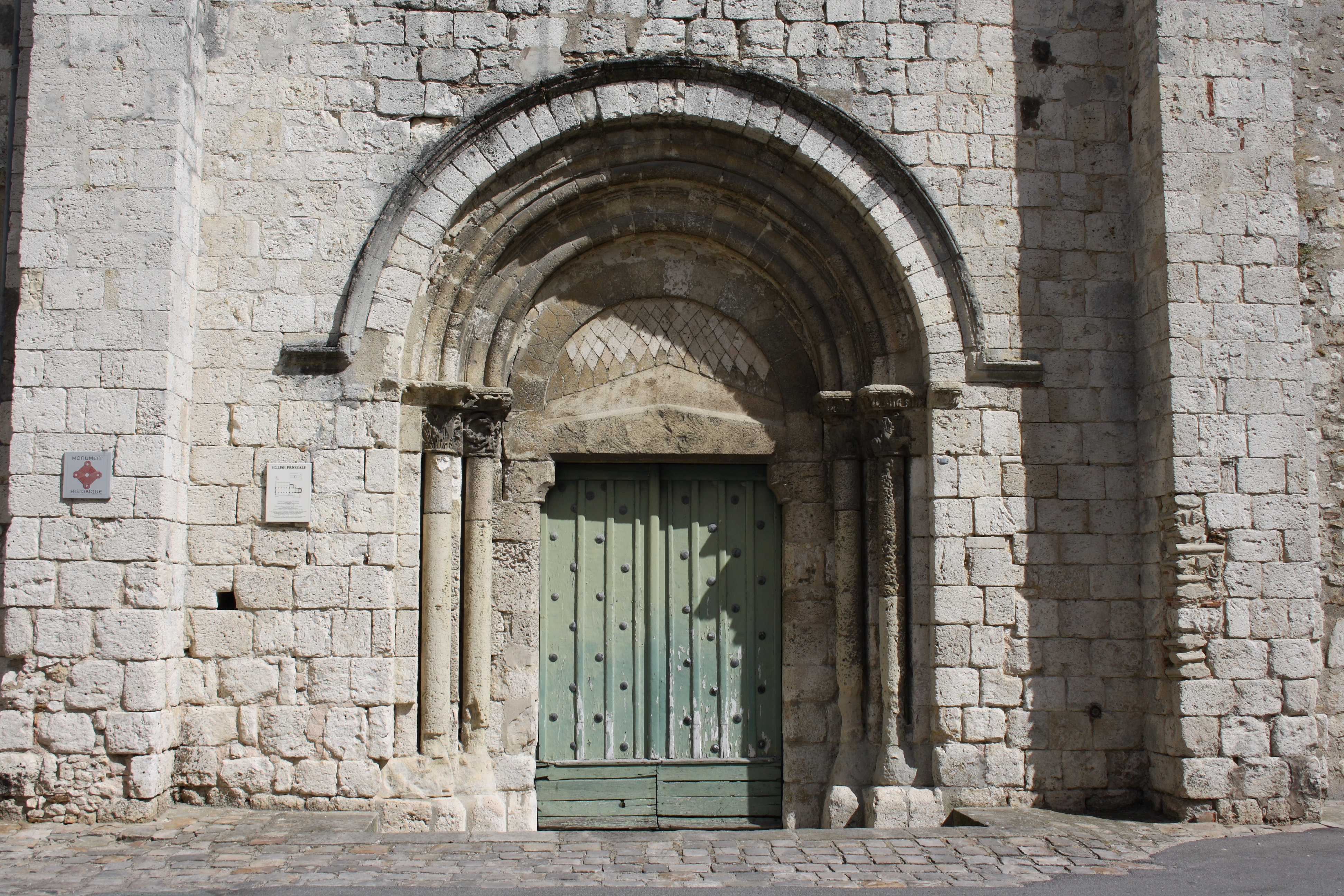 Katholische Pfarrkirche Saint-Nicolas in Saint-Arnoult-en-Yvelines im Département Yvelines in der Region Île-de-France (Frankreich), Rundbogenportal mit Archivolten und Tympanon mit Rautenmuster aus der ersten Hälfte des 12. Jahrhunderts.